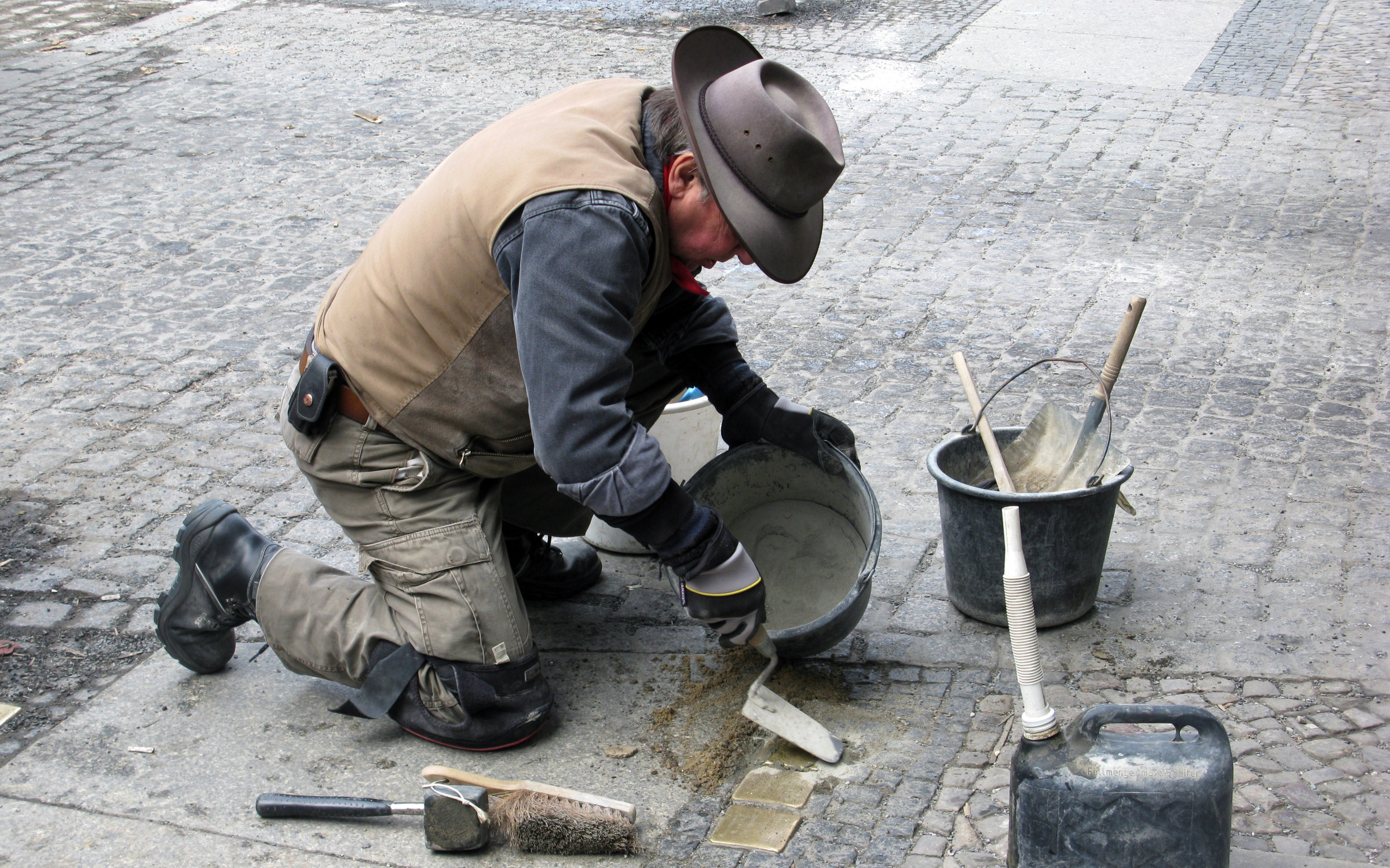 Neuverlegung des Stolpersteins für Walter Schaefer, Graefestraße 91, Berlin-Kreuzberg